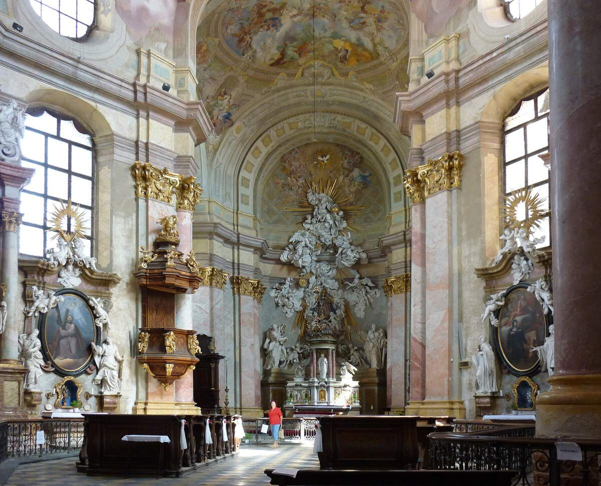 Opatský chrám sv. Petra a Pavla - interiér